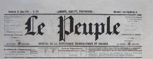 "Le Peuple" édité par Pierre-Joseph Proudhon - En-tête du numéro124 du 23 mars 1849.